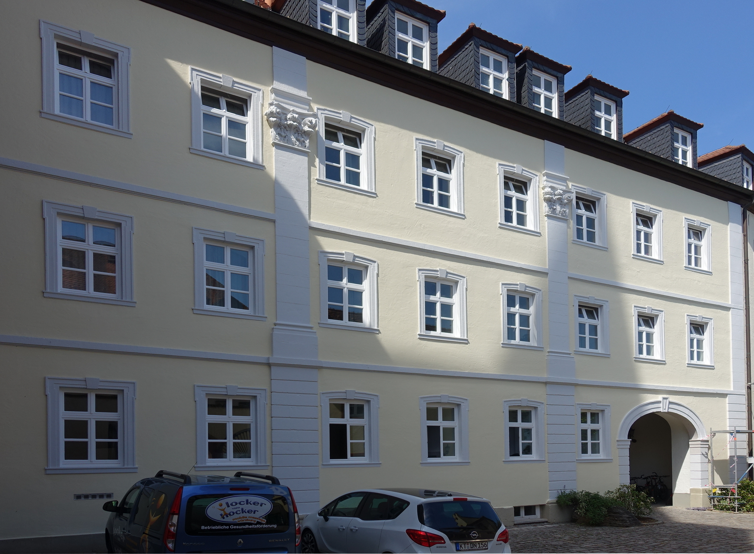 Ehemalige Kaserne